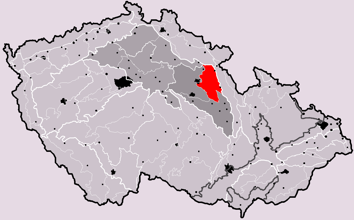 Poloha geomorfologického celku Orlická tabule v rámci České republiky. Hercynský systém Hercynská pohoří I Česká vysočina I6 (VI) Česká tabule I6C (VIC) Východočeská tabule I6C-2 (VIC-2) Orlická tabule